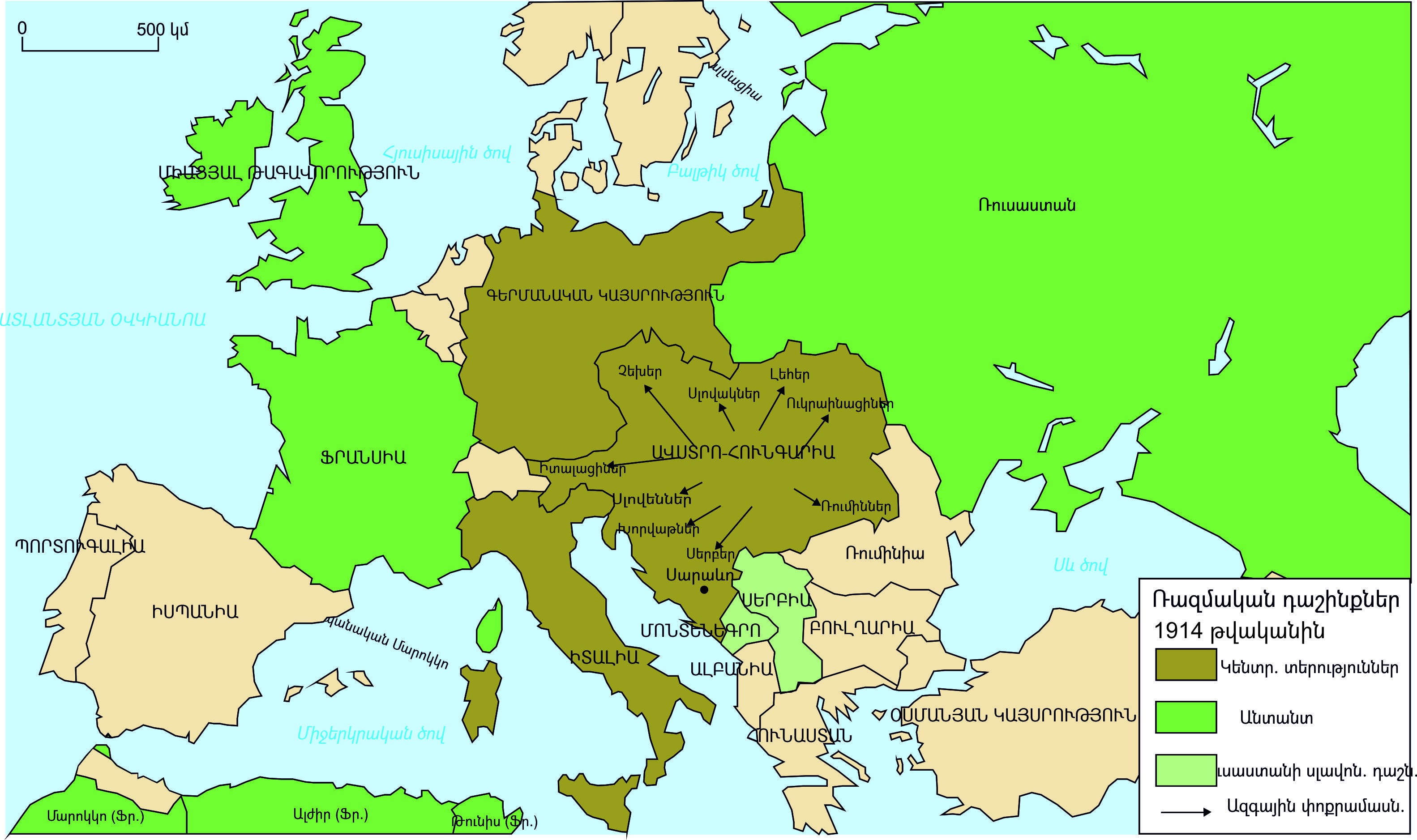 Եվրոպայում 1914 թվականի ռազմական դաշինքները